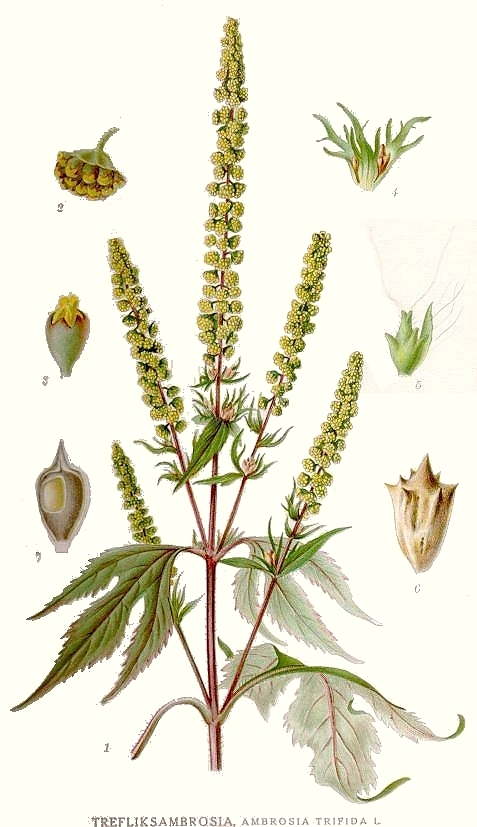 Original Description Trefliksambrosia, Ambrosia trifida L.